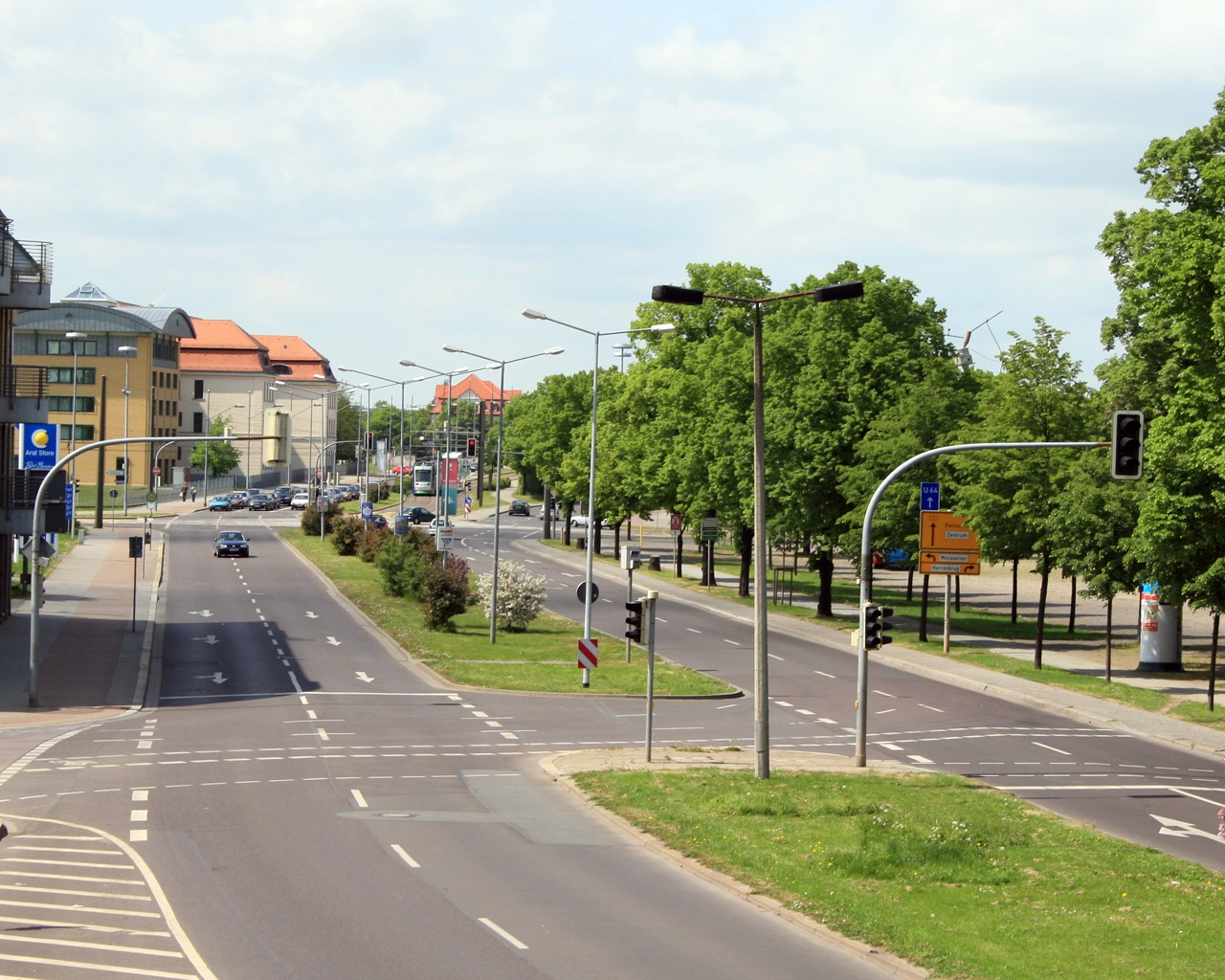 Die Jerichower Straße (Bundesstraße 1) in Magdeburgs Osten.